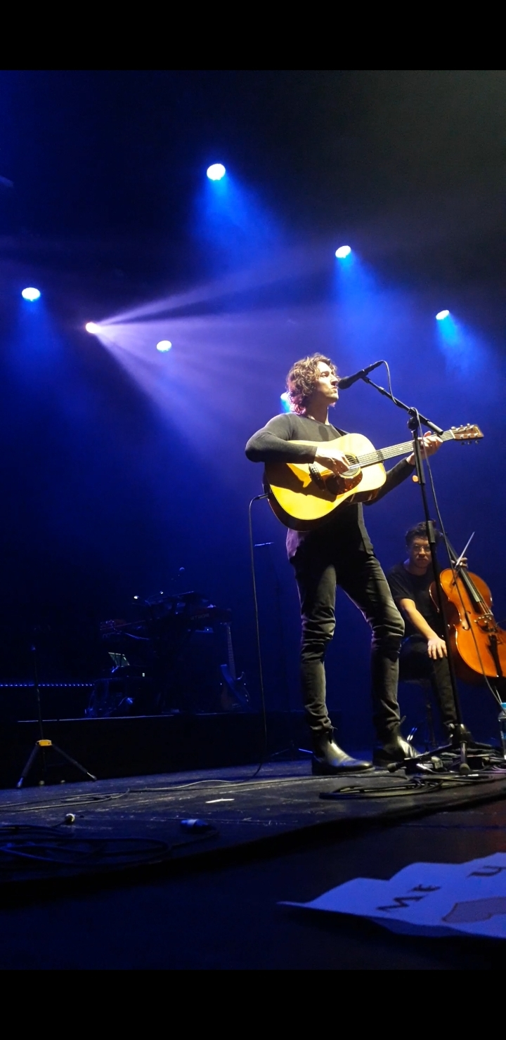 Dean Lewis. Concert in Utrecht, Netherlands. 23 June 2019.